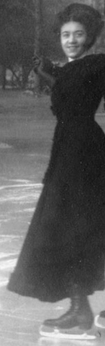 Ludowika and Walter Jakobsson